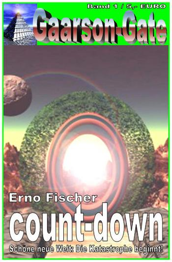 Titelbild Gaarson-Gate Band 1